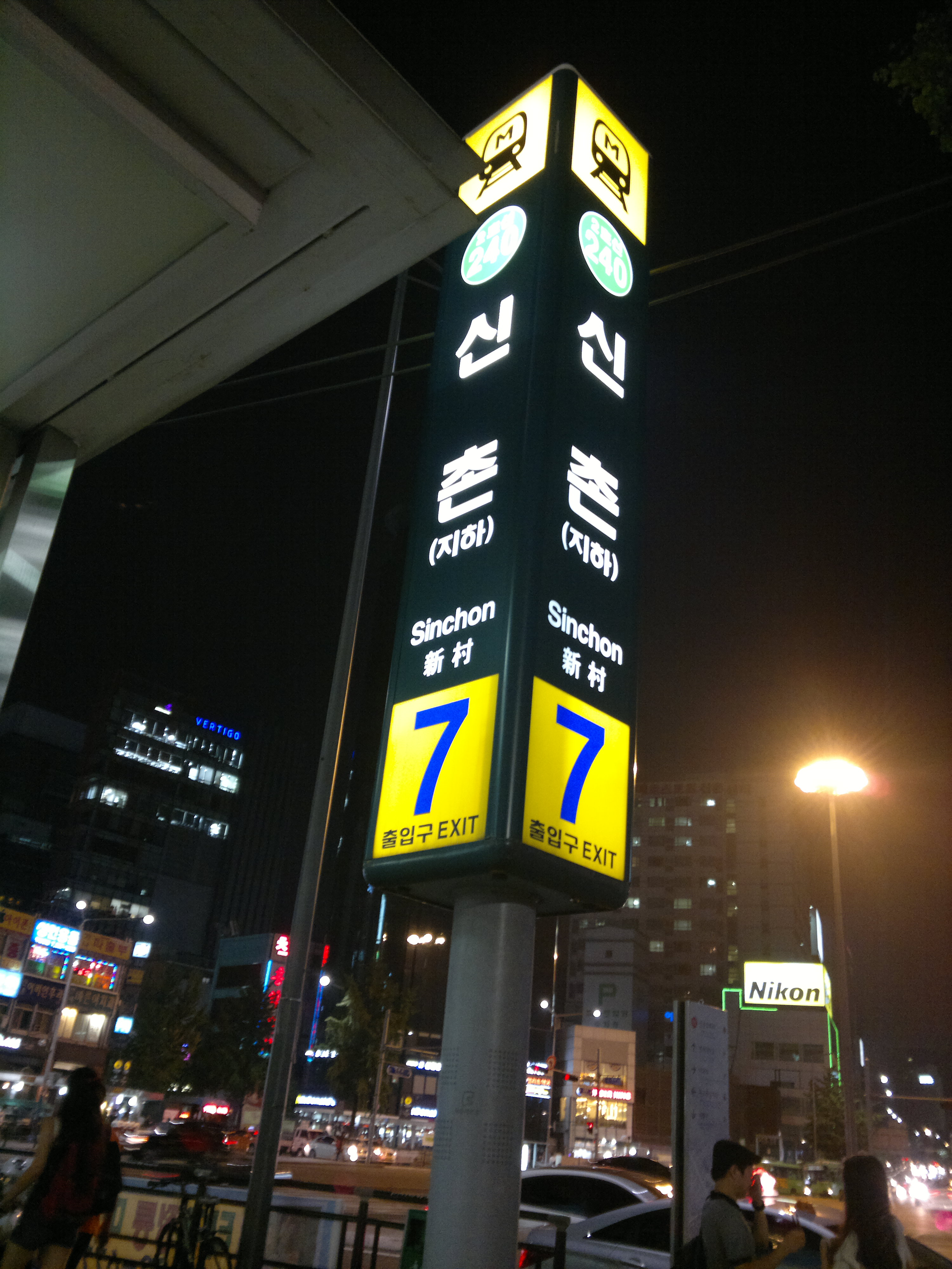 首爾地鐵新村站七號出口